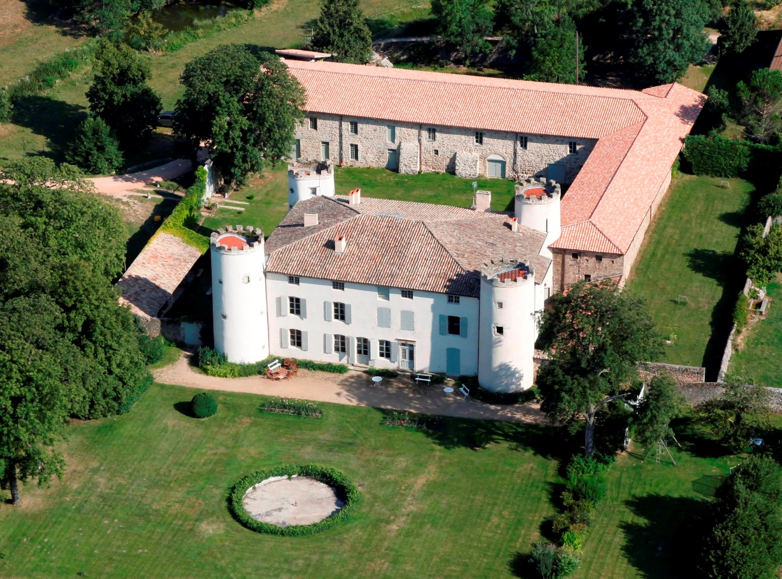 Félines détail